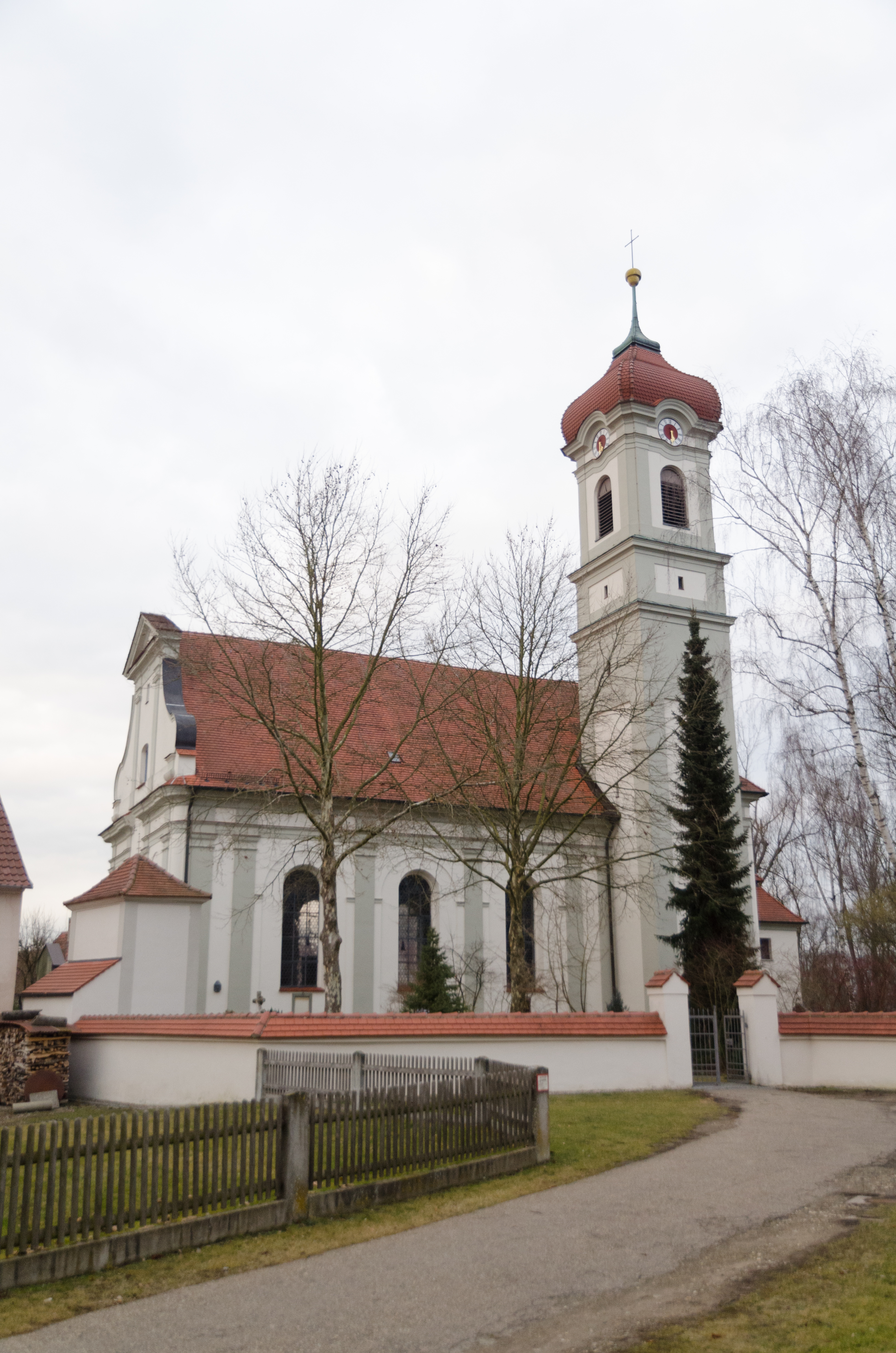 Nersingen, Lkrs. Neu-Ulm, Ortsteil Straße, Kath.m Pfarrkriche St. Johann Baptist